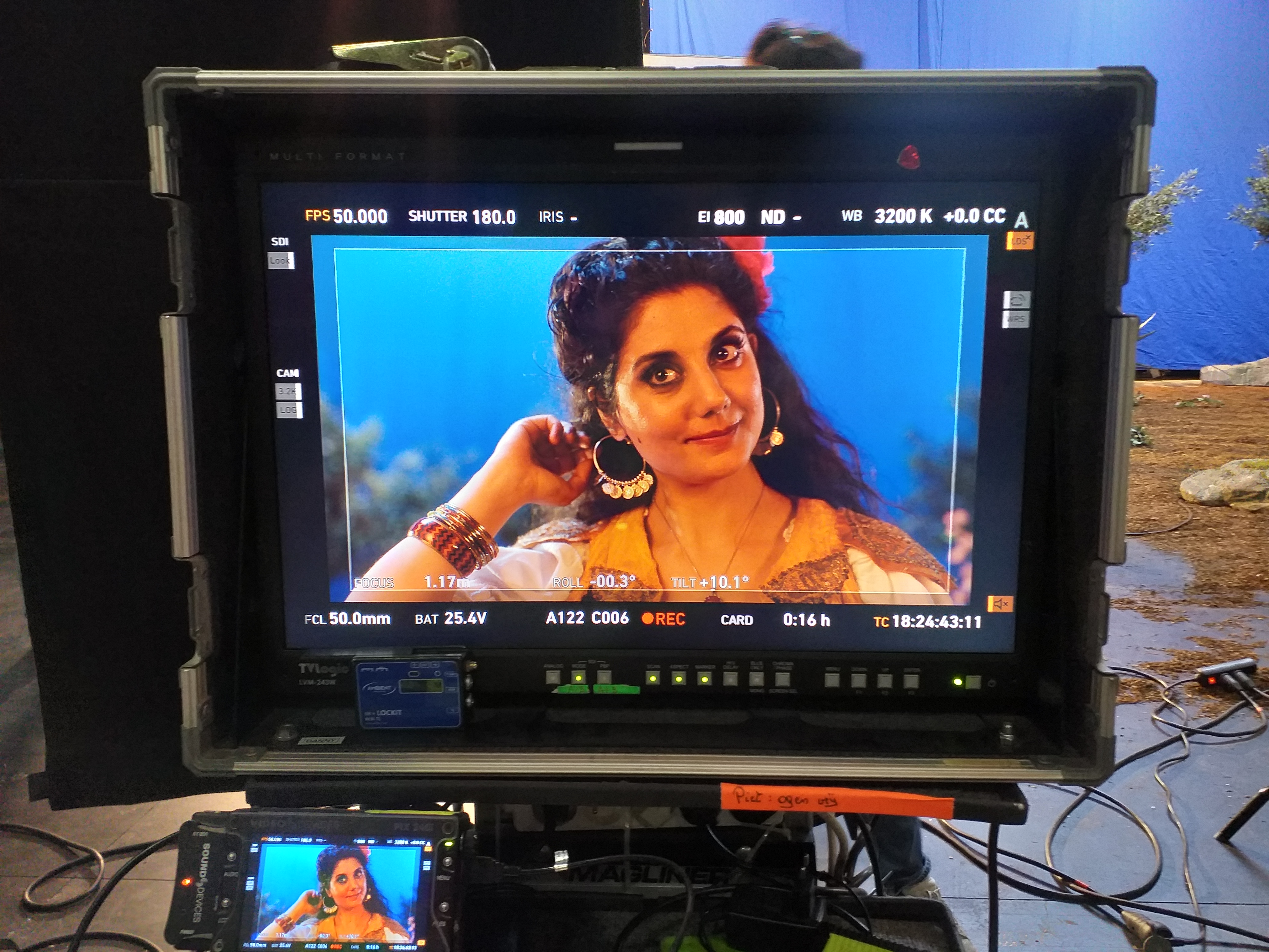 Dag Sinterklaas